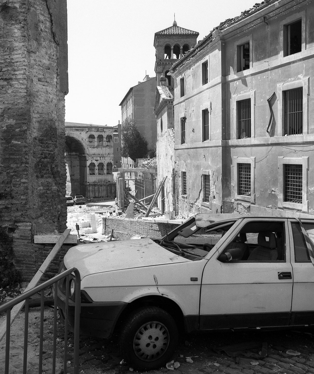 Attentato a San Giorgio al Velabro 1993